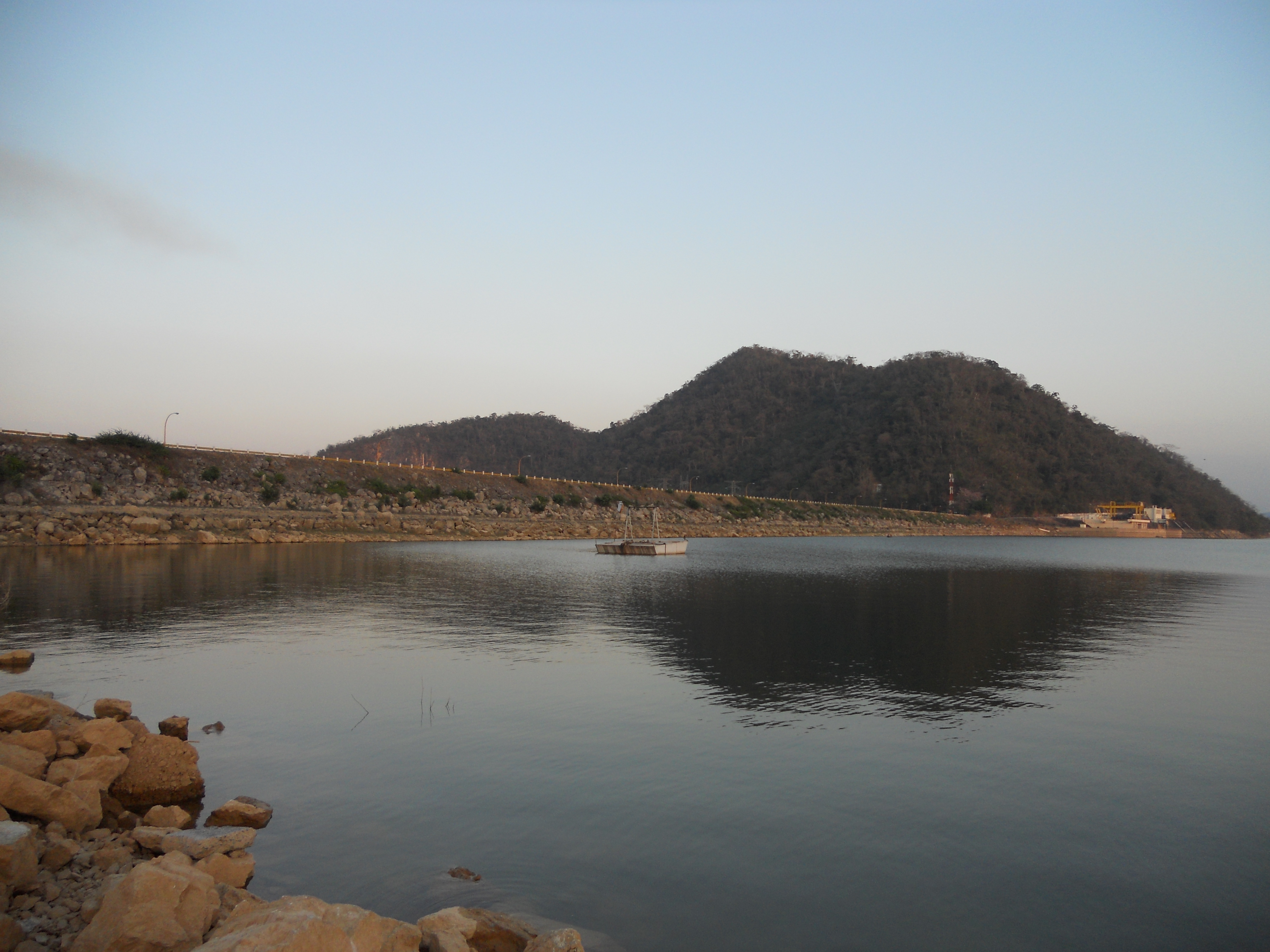 Cortina de la Presa Temascal, vista desde el interior de la presa.